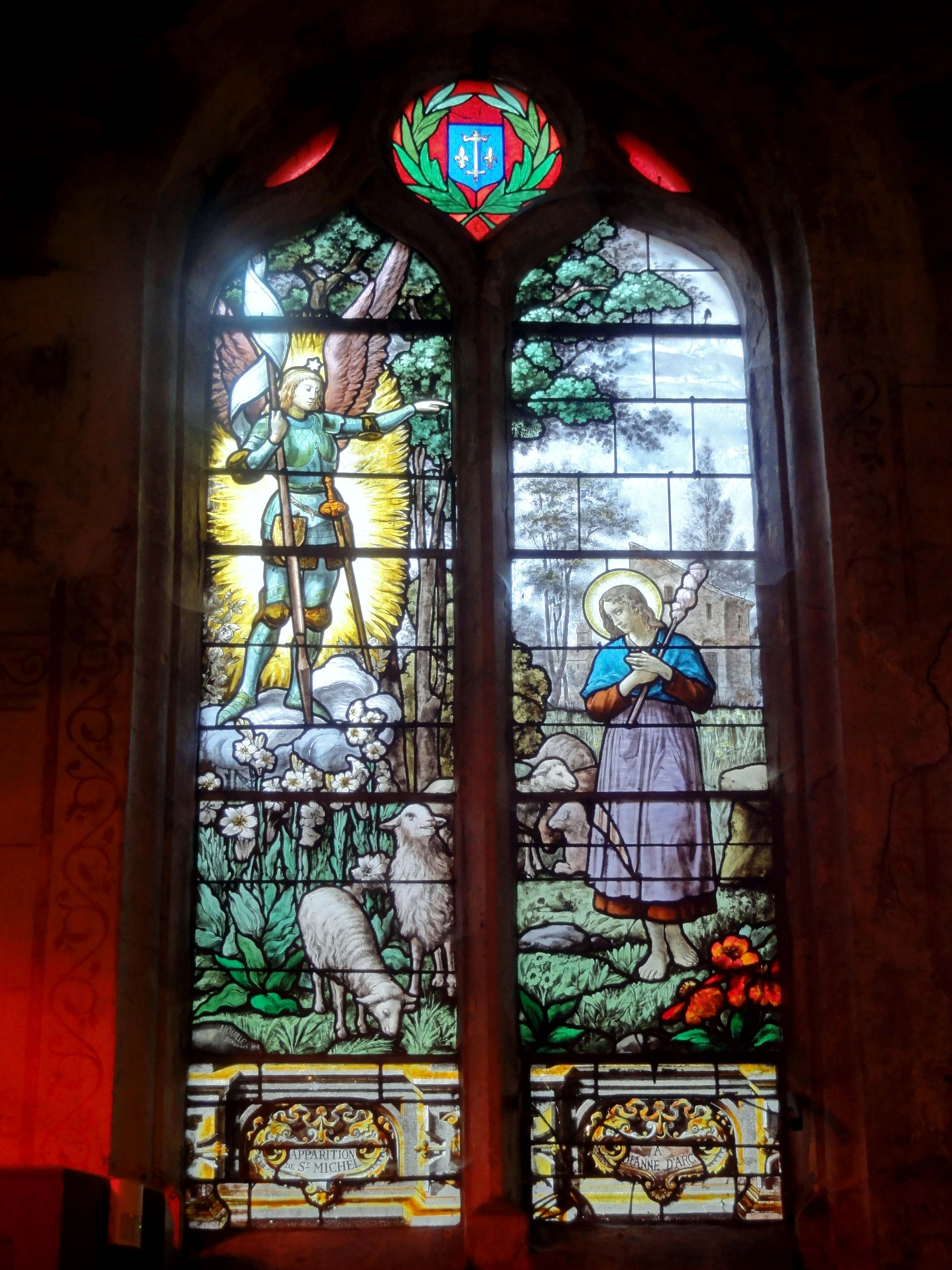 Vitrail de la fin du XIXe siècle ; Lucien Koch, Beauvais)).